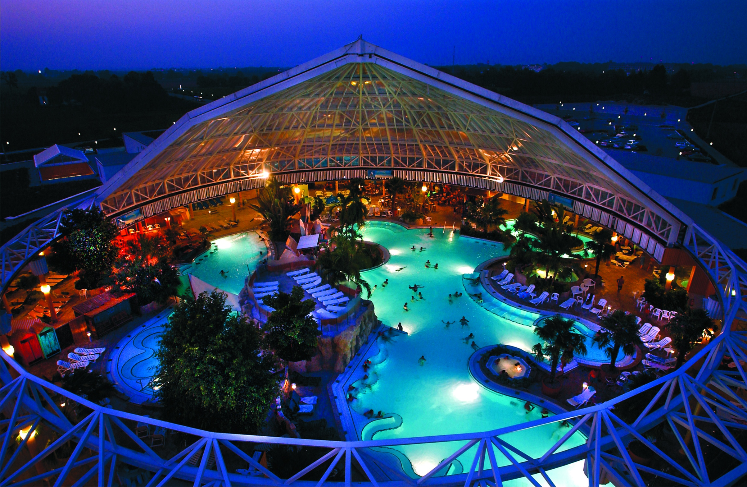 Thermenparadies Außenansicht Kuppel offen